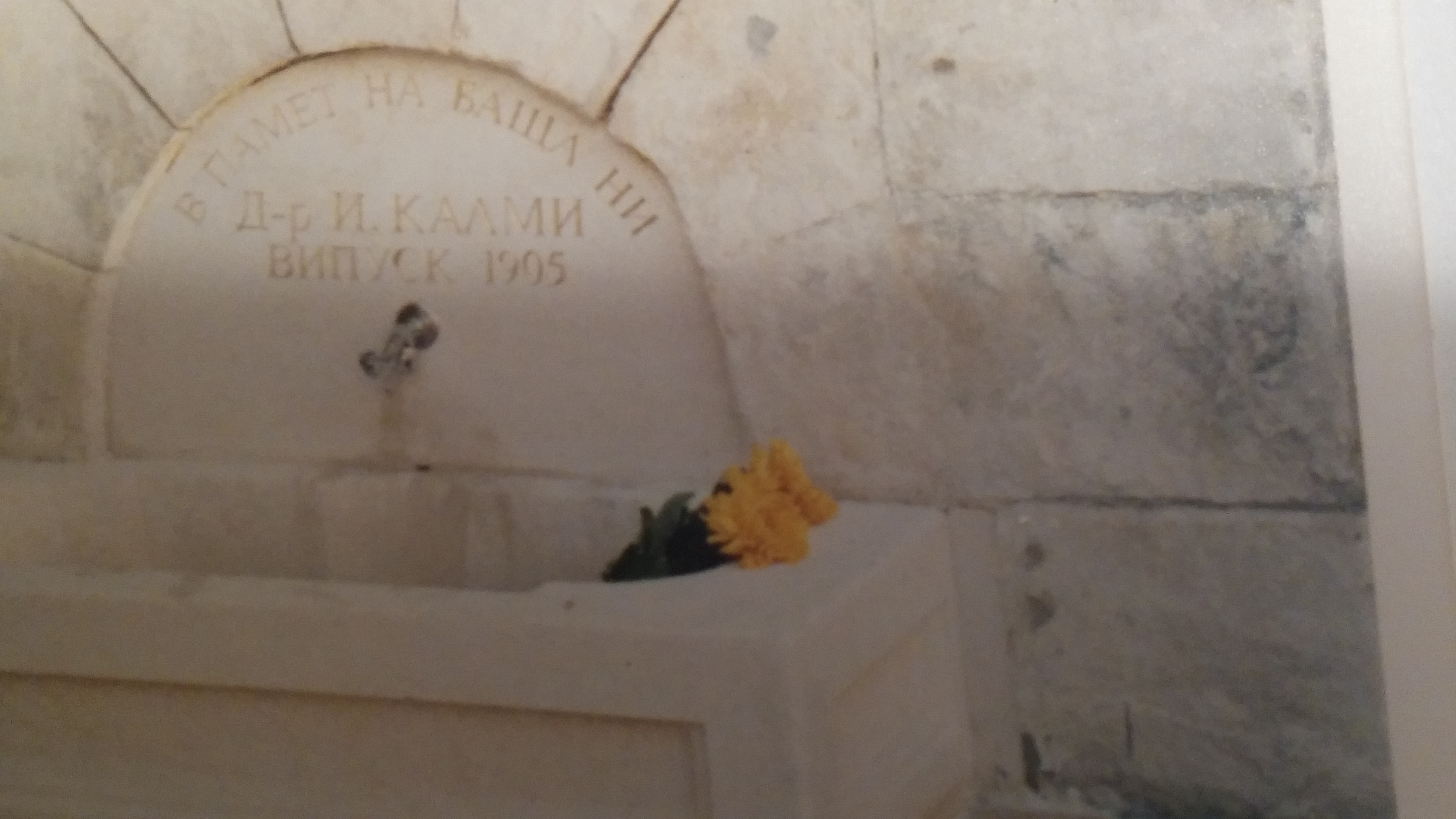 ברזית המים, בתיכון כריסטו בוטב, ברוסצ'וק שהוקמו לזכרו של דר' ישראל קלמי